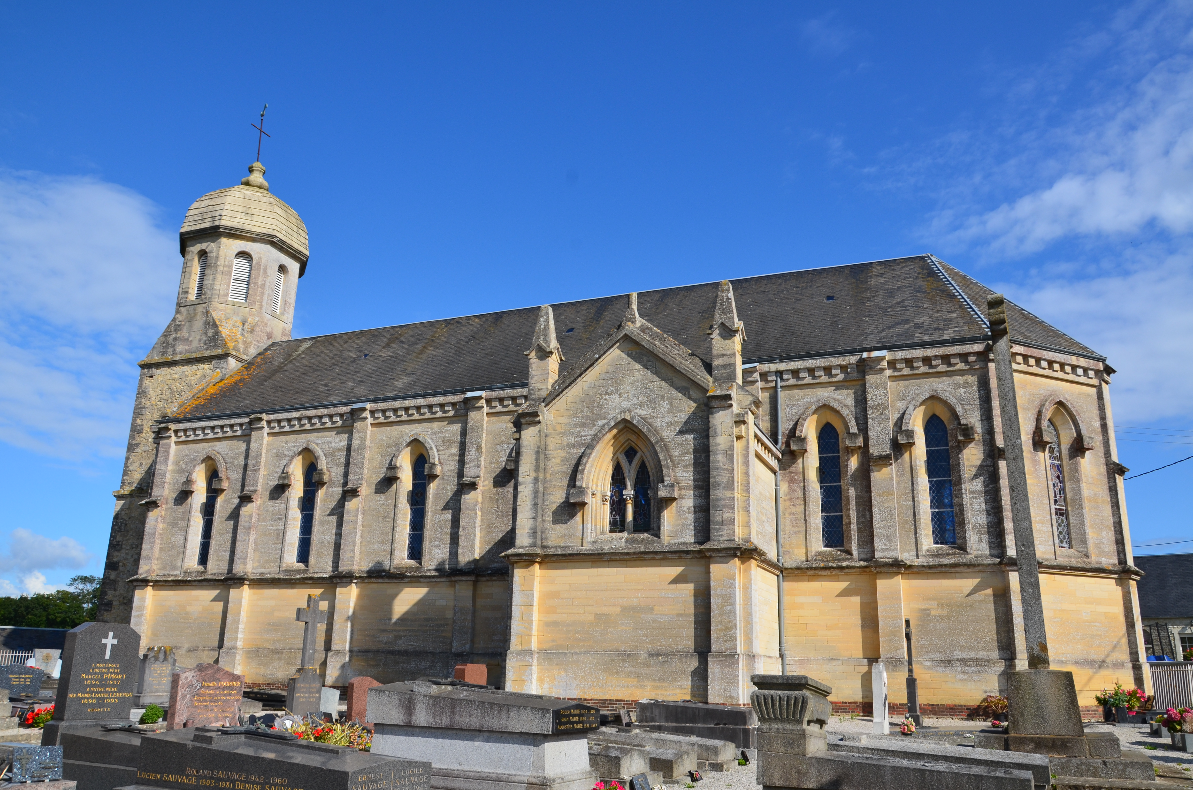 Église Saint-Germain de Saint-Germain-du-Pert.